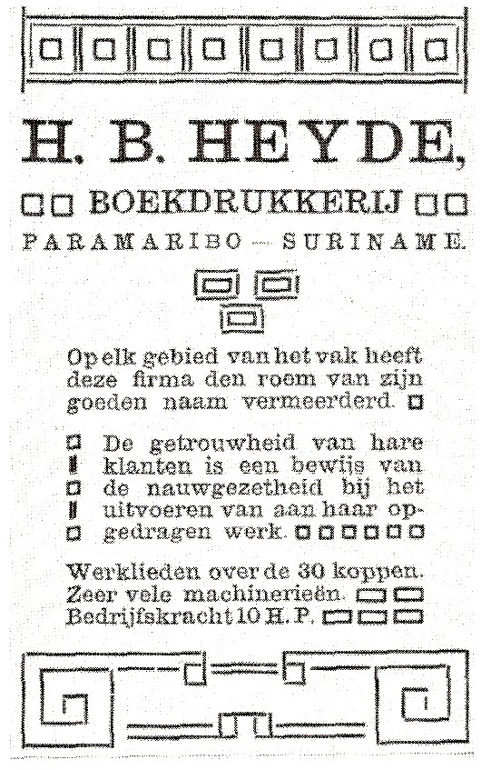 Advertentie van drukkerij H.B. Heyde, begin 20ste eeuw. Drukkerij van Surinaamse_literatuur. Eigen scan, beschikbaar gesteld voor publiek domein.